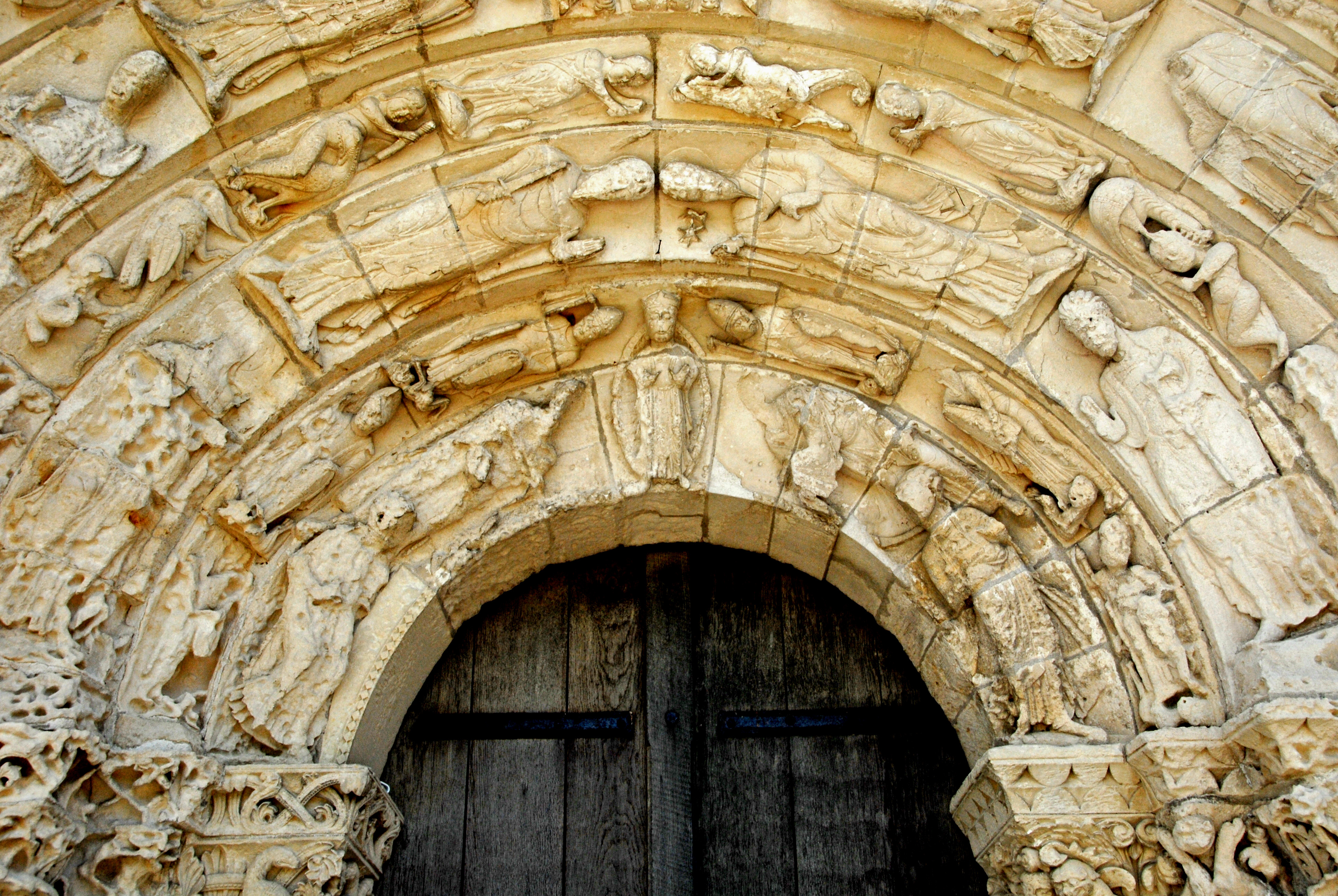 Chadenac, Portal, Archivolten - Detail, unten Mitte